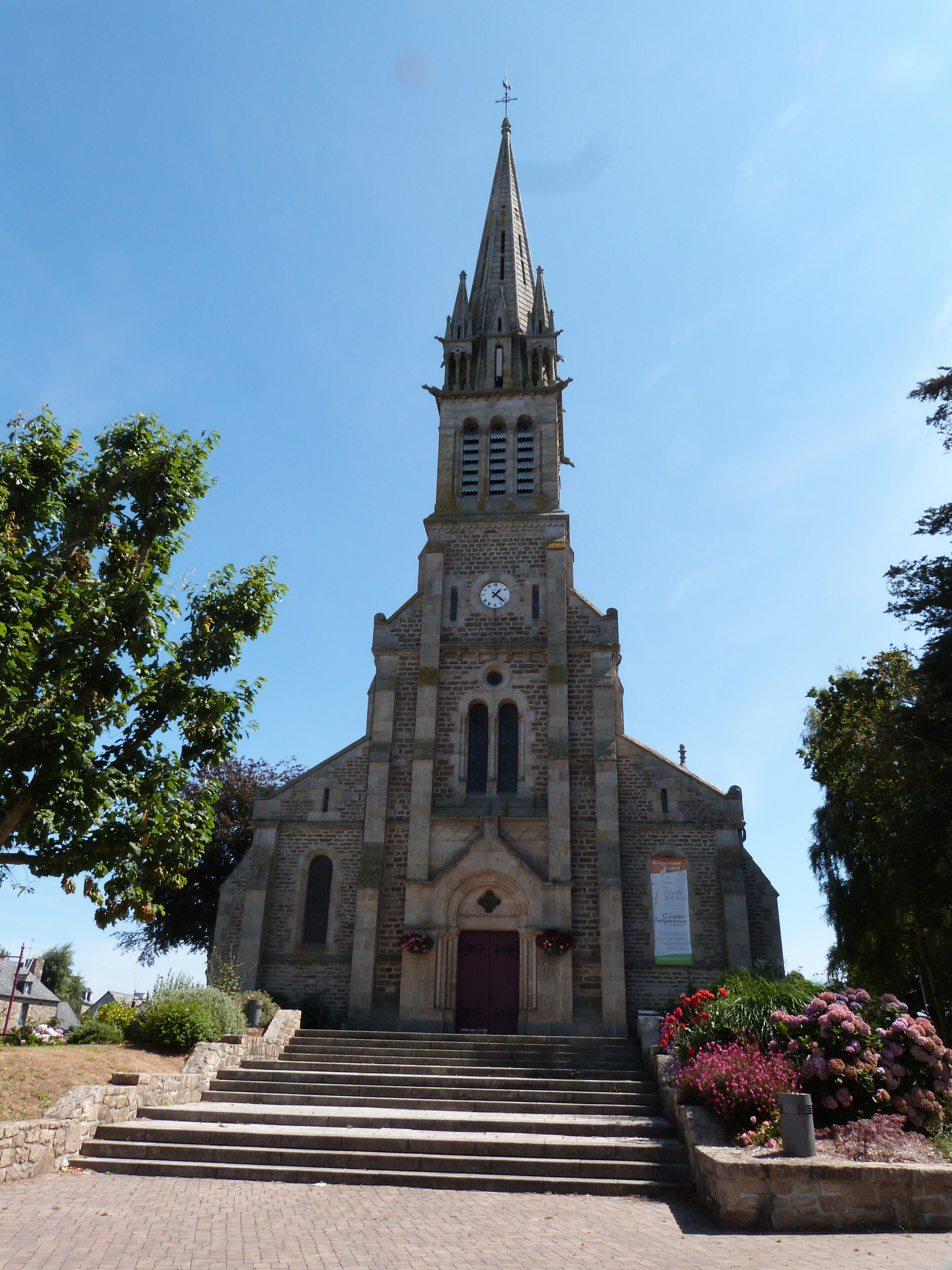 Eglise Saint-Pierre de Pommeret